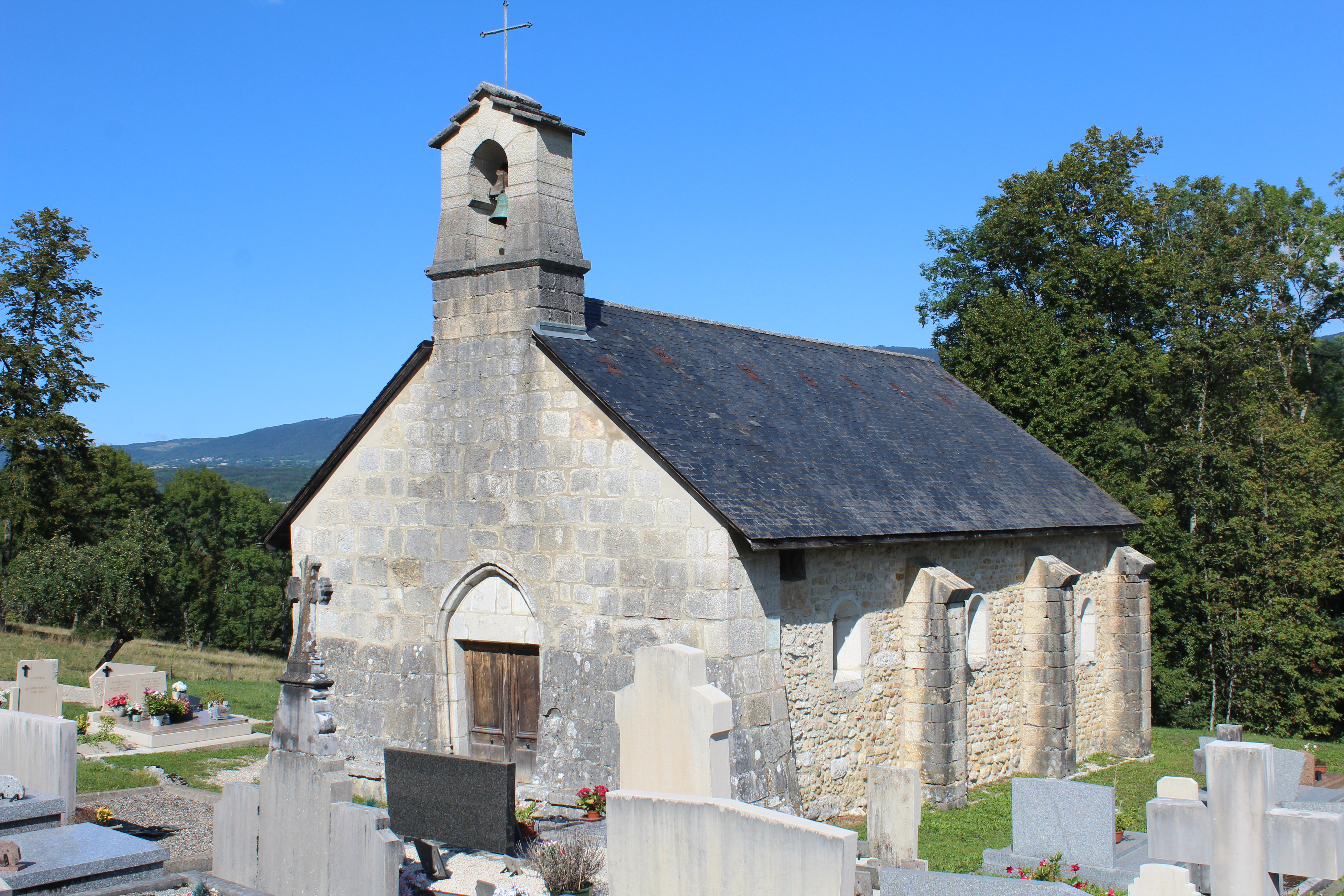 Chapelle Saint-Antoine et Saint-Maurice de Luthézieu, Belmont-Luthézieu.